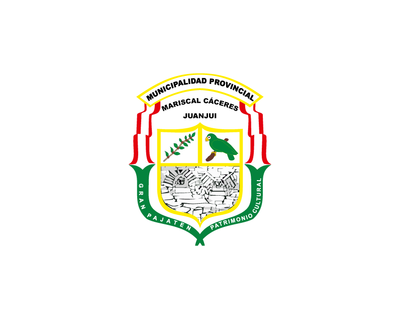 Bandera de la provincia de Mariscal Cáceres-Juanjuí (San Martín)